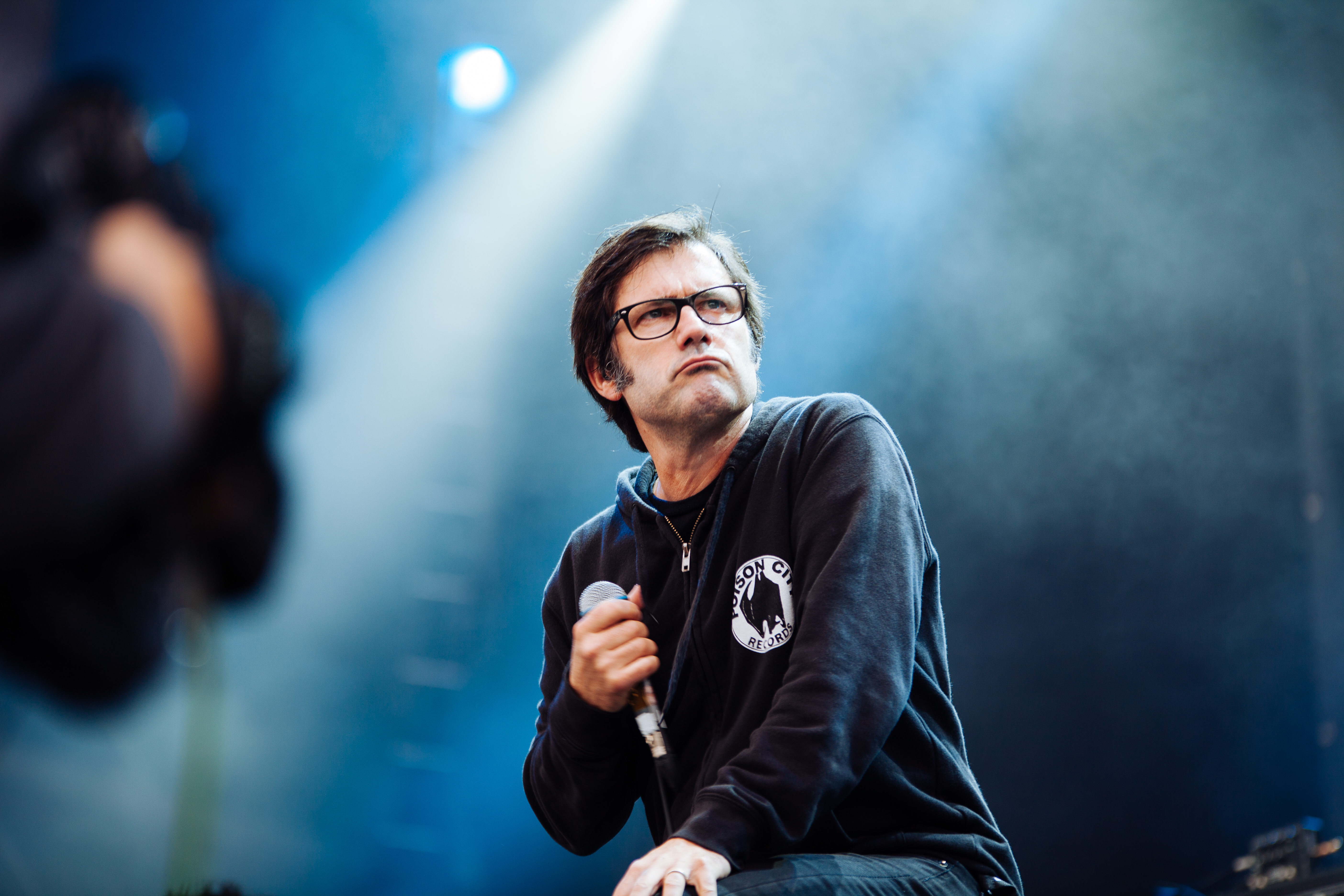 Joey Cape von Lagwagon